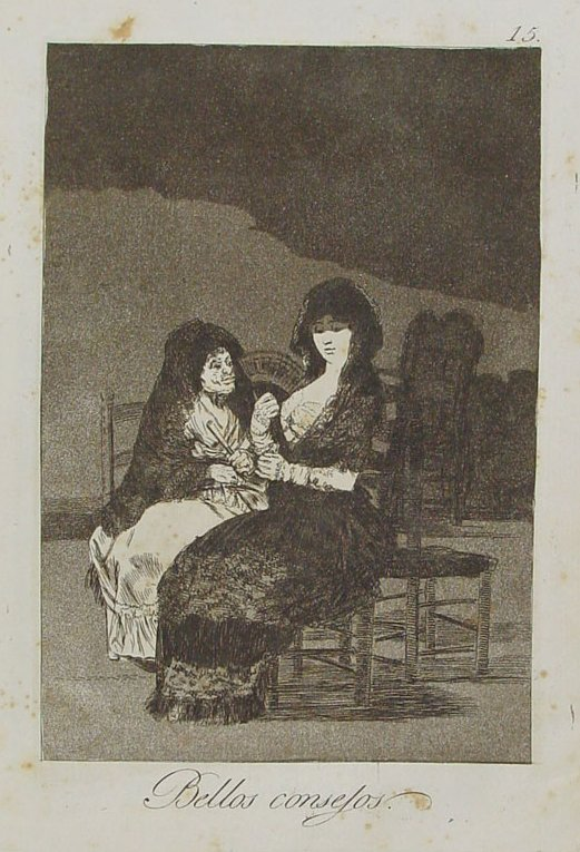 Capricho nº 15: Bellos consejos de Goya, serie Los Caprichos